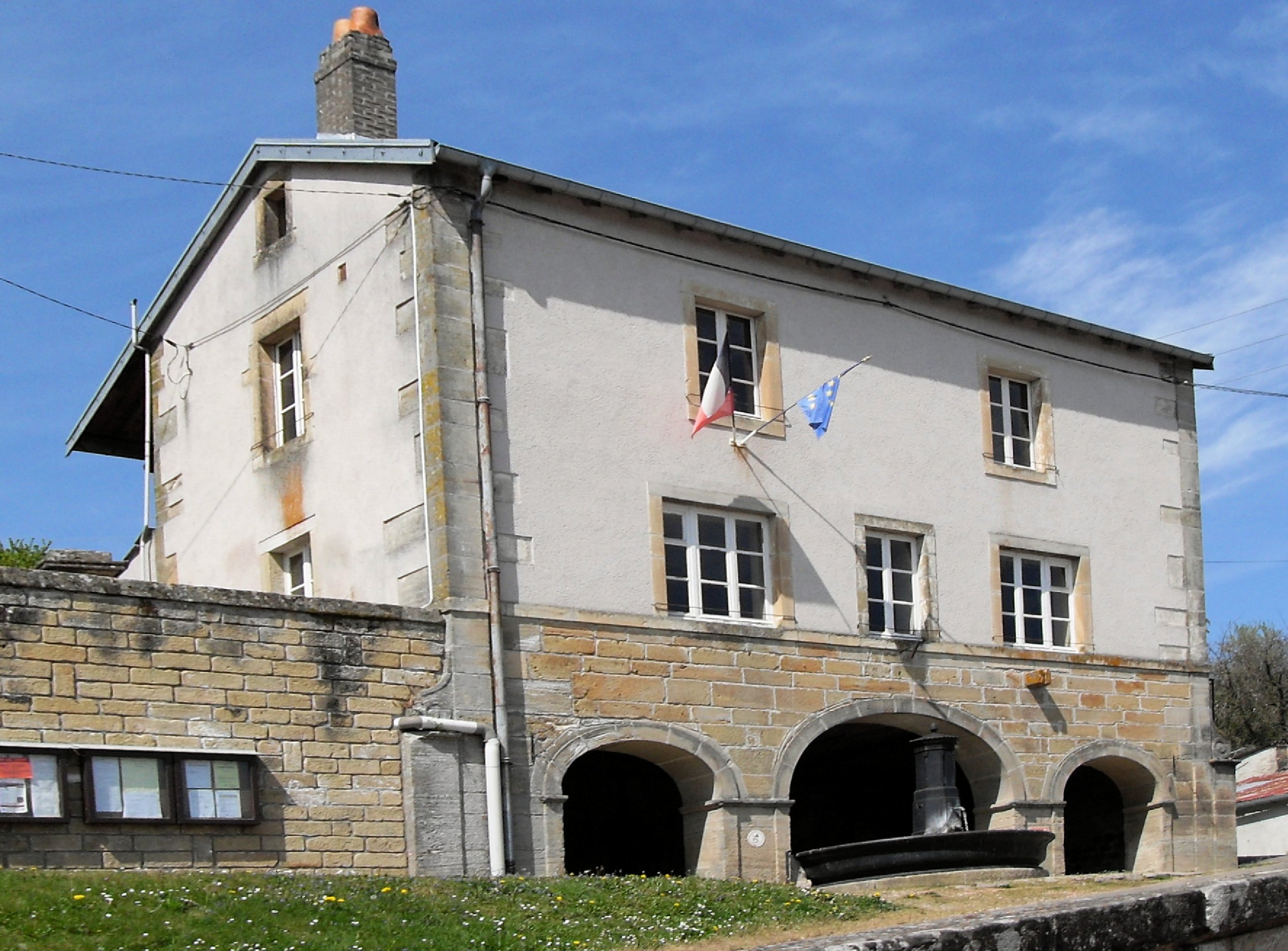 La mairie et lavoir de La Vacheresse-et-la-Rouillie